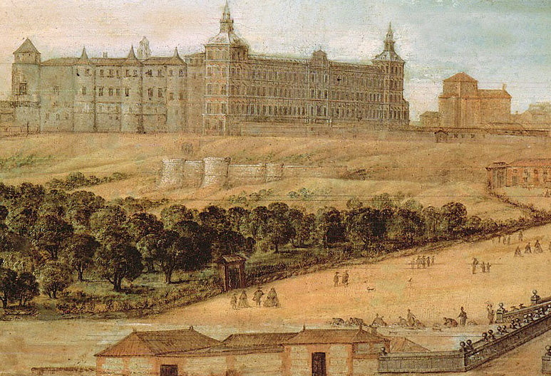 Vista del Alcázar de Madrid (detalle), Museo de Historia de Madrid.